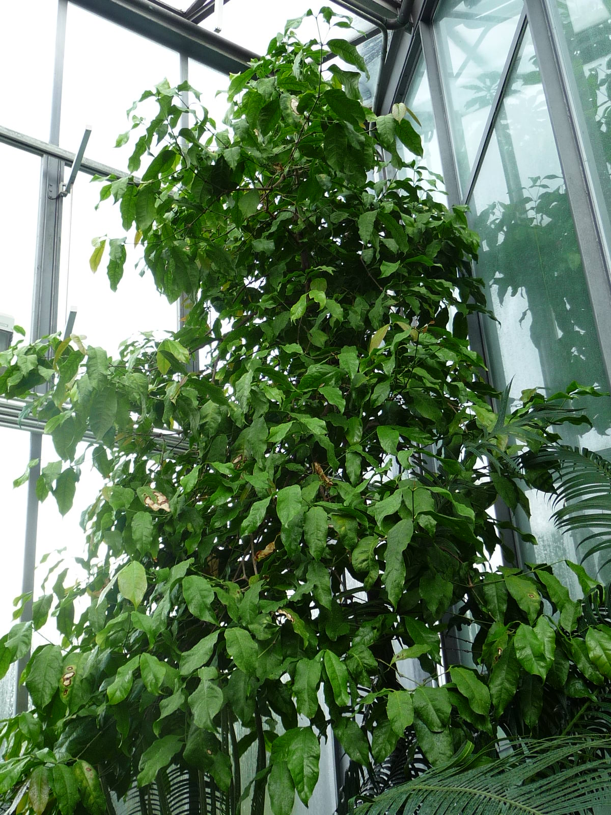 Gnetum gnemon var. gnemon (Hamburgi pálmaház)